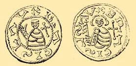 Břetislav I. - denáry